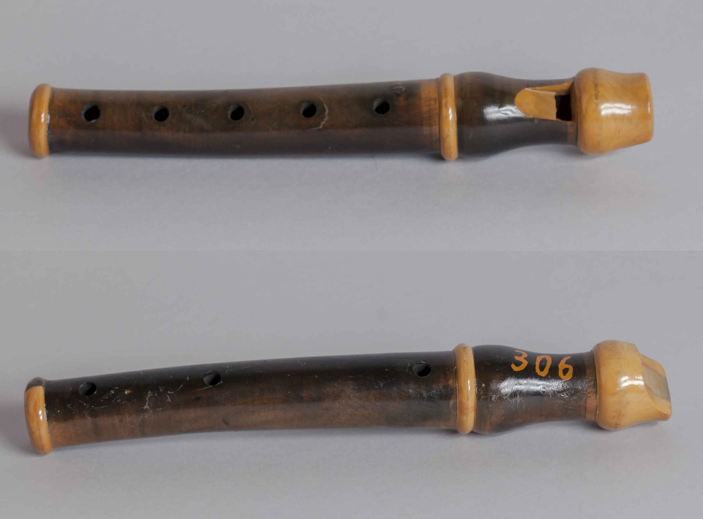 Flabiol, MDMB 306, primera meitat del segle XX, Museu de la Música de Barcelona